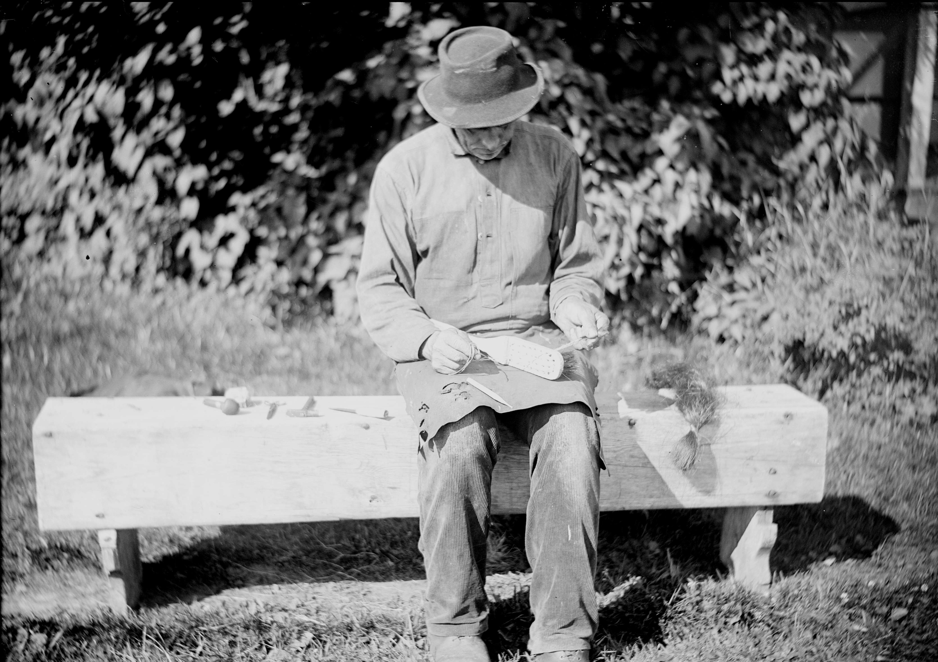 Borstmakare. En tåt av hästtagel drages i sitt läge med hjälp av ett snöre. Mangskogs socken i Värmland.